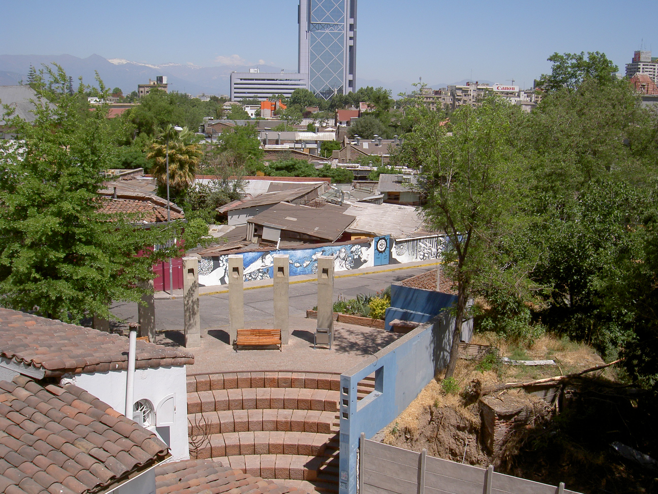 Barrio Bellavista seen from La Chascona, Santiago, Chile.